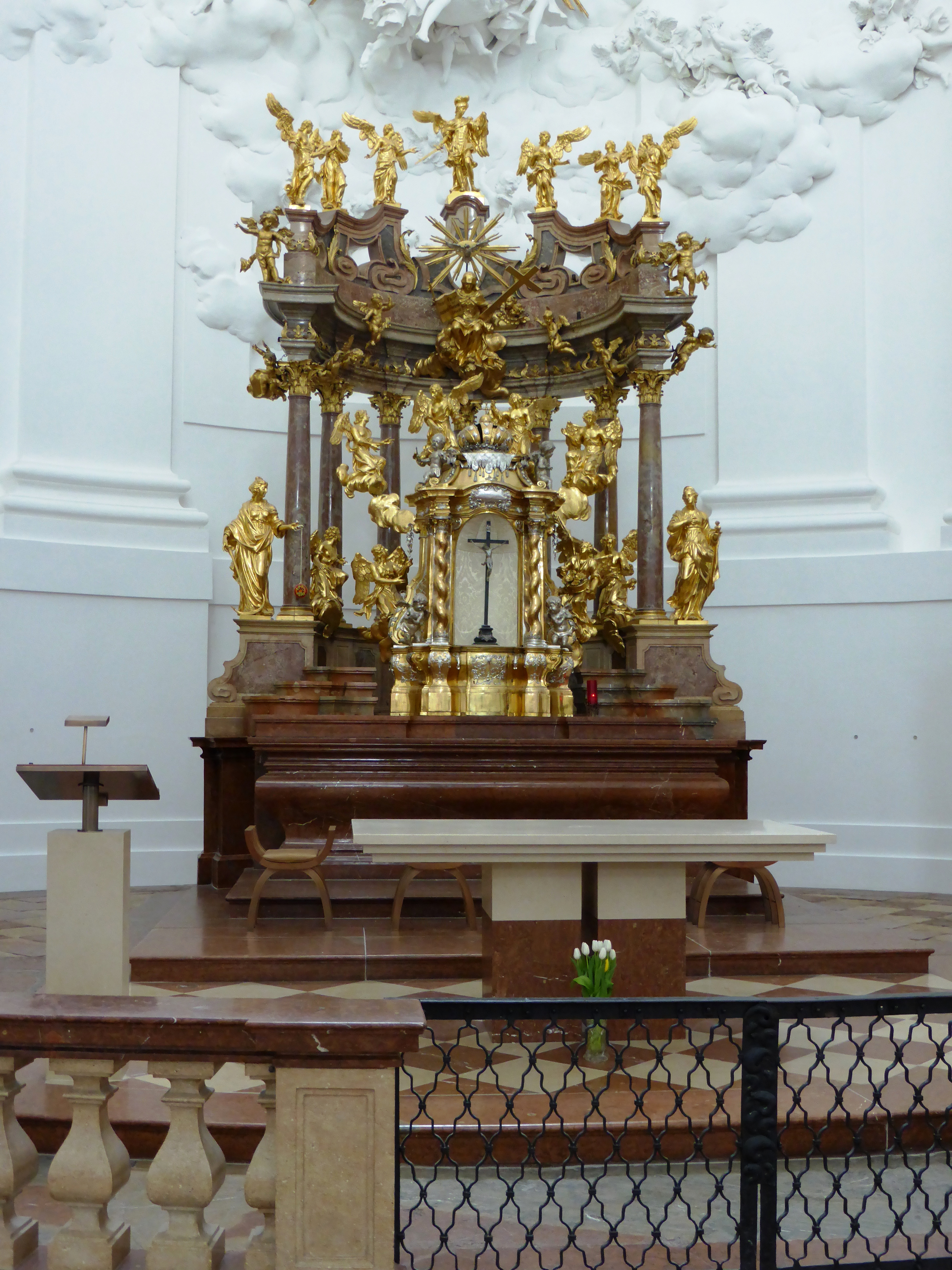 Hochaltaraufbau Entwurf von Johann Kleber, ikonografische Programm P. Bernard Stuart OSB, Ausführung Joseph Anton Pfaffinger.